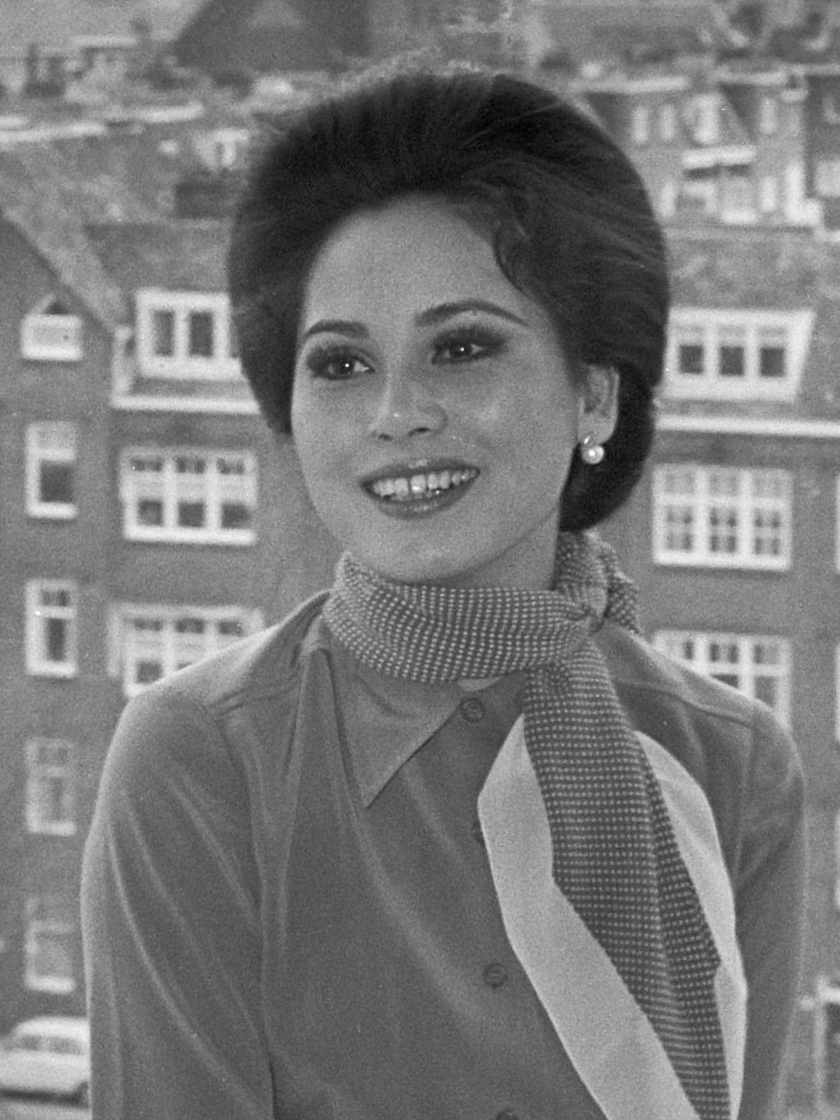 Ratna Sari Dewi Soekarno, vrouw van de afgezette president Soekarno van Indonesië met op de achtergrond Amsterdam 29 april 1970